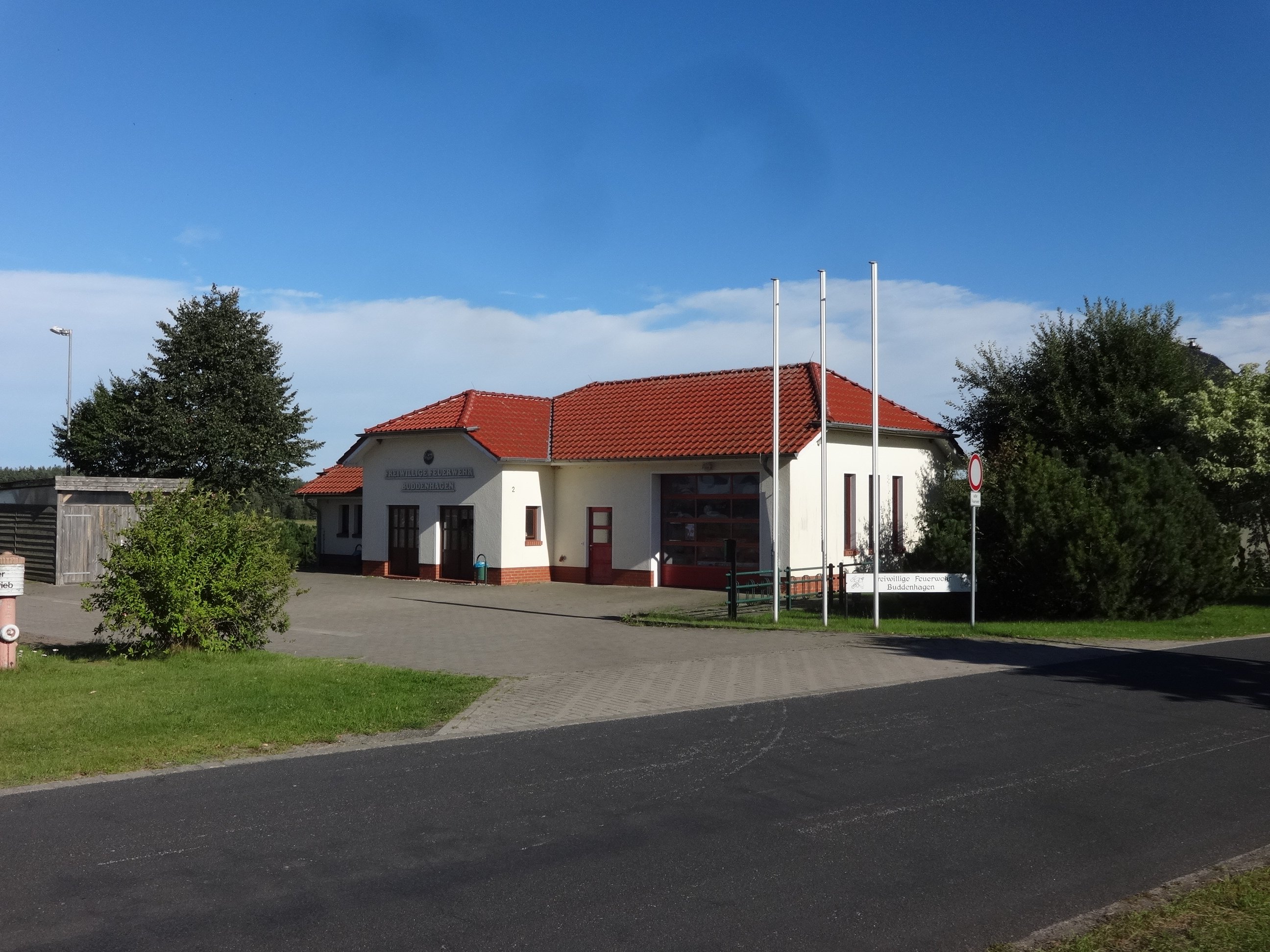 Gebäude der Freiwilligen Feuerwehr in Buddenhagen (Wolgast), Vorpommern-Greifswald